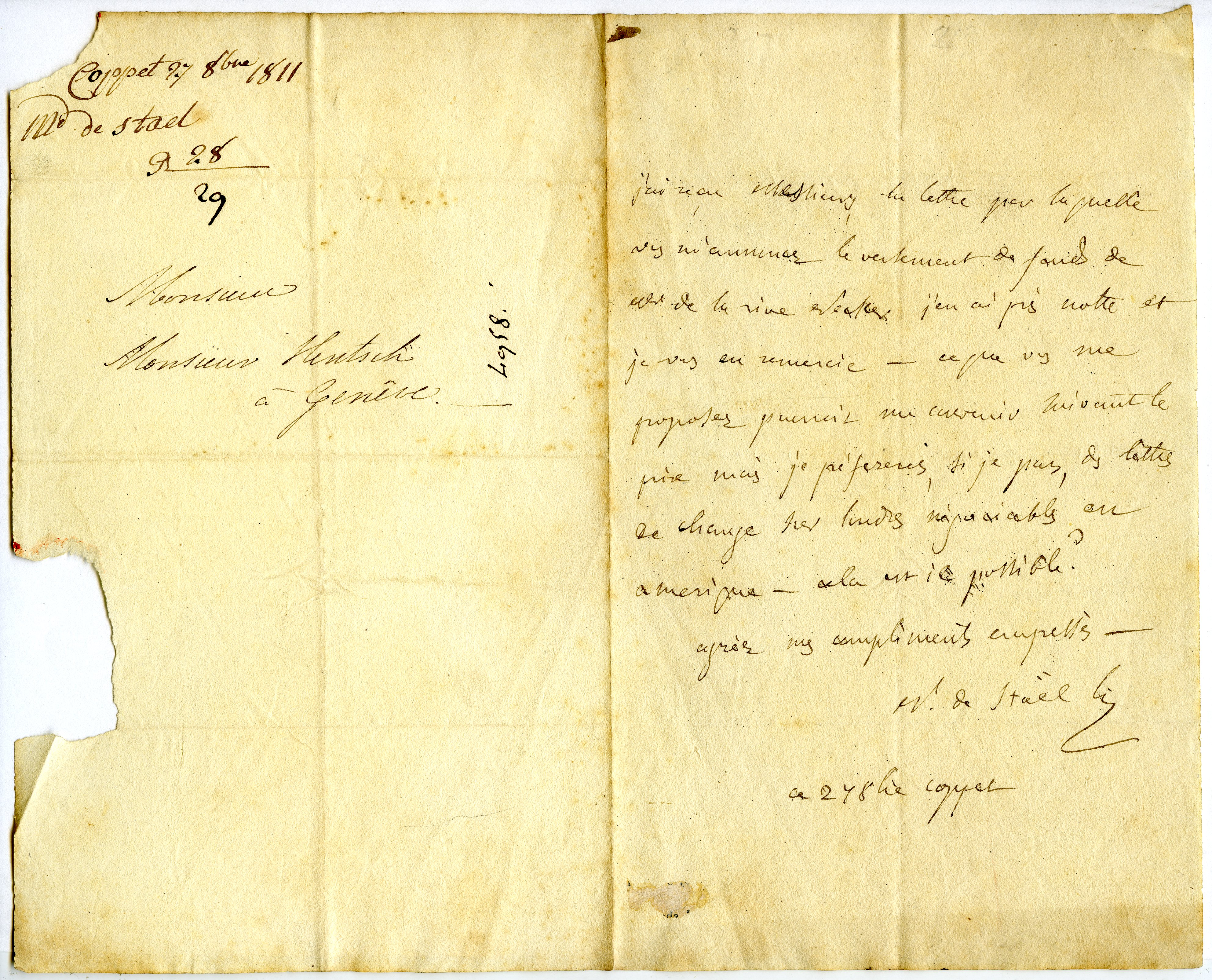 Madame de Staël: Lettre à Henri Hentsch (Coppet, 27 octobre 1811)